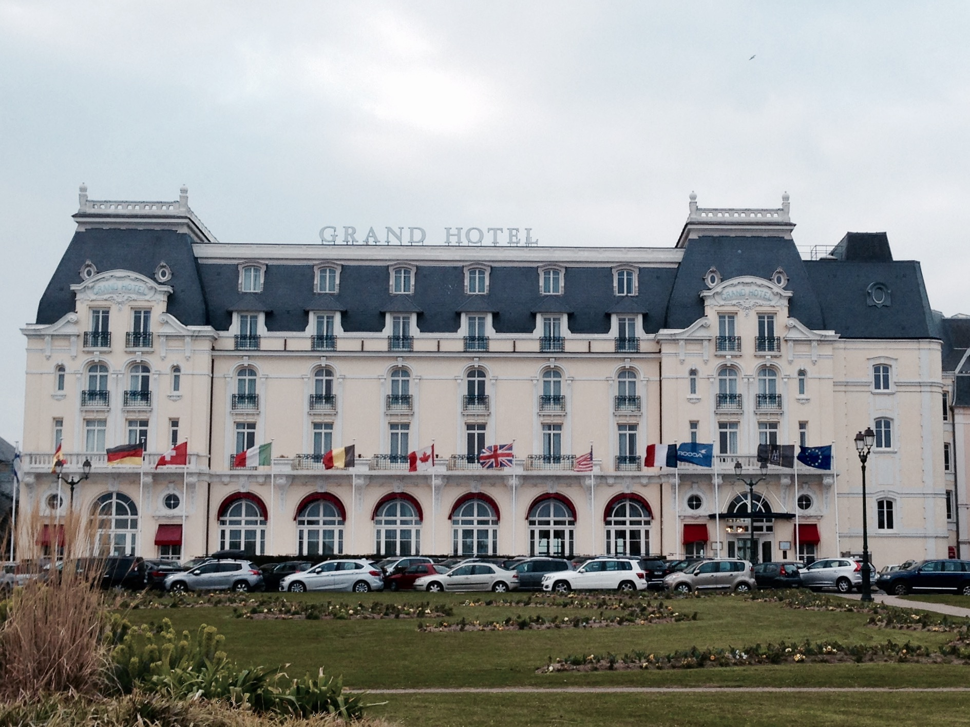 Grand Hôtel de Cabourg Cabourg, France